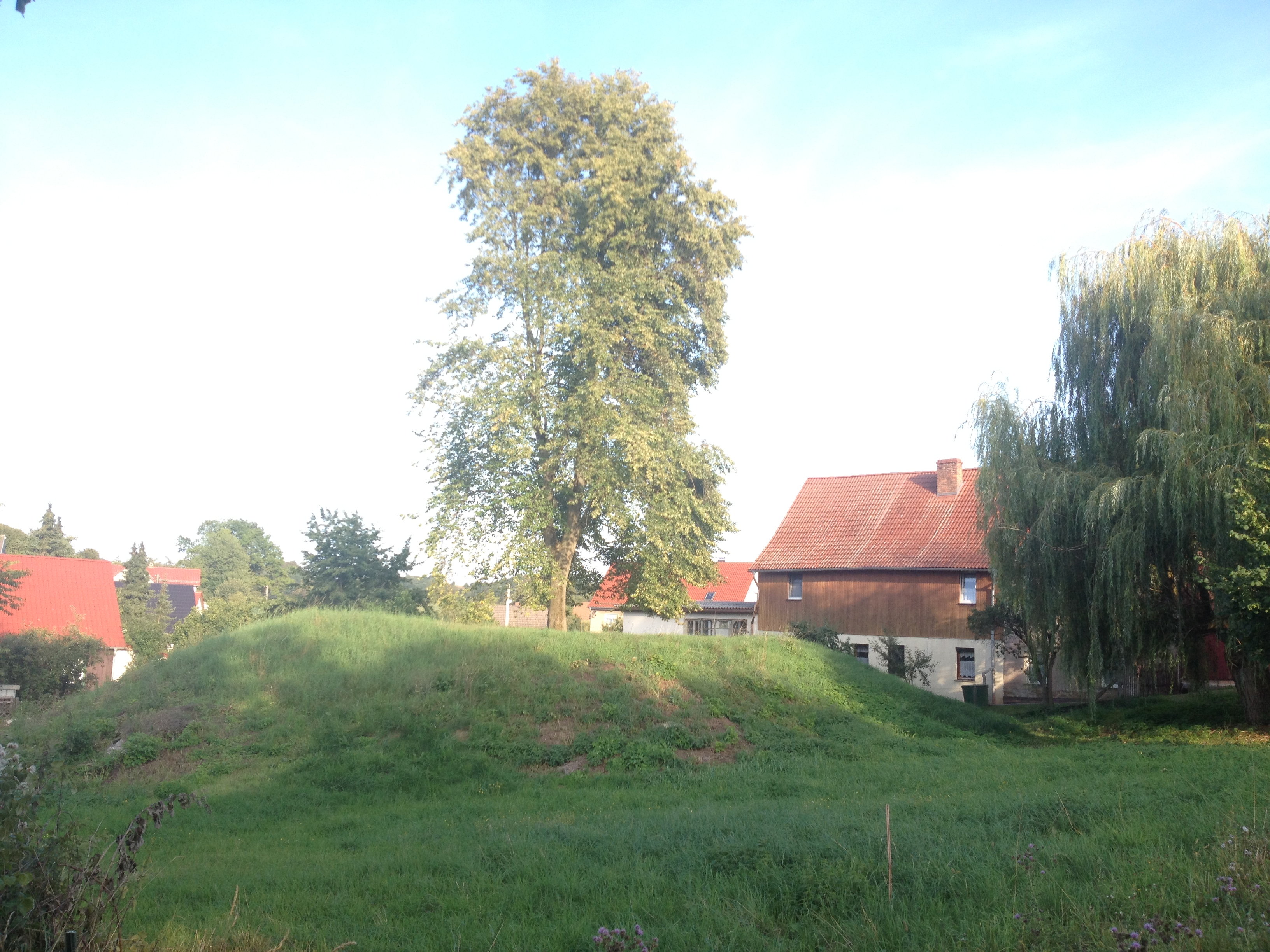 Heidnische Thingstätte